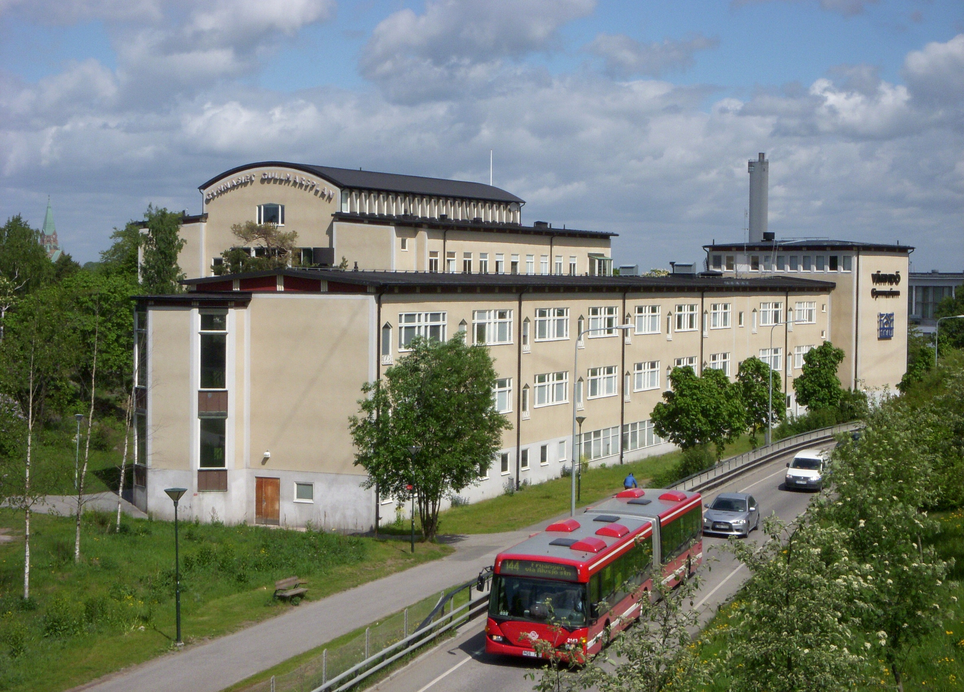 Värmdö Gymnasium vid Gullmarsplan, Årsta